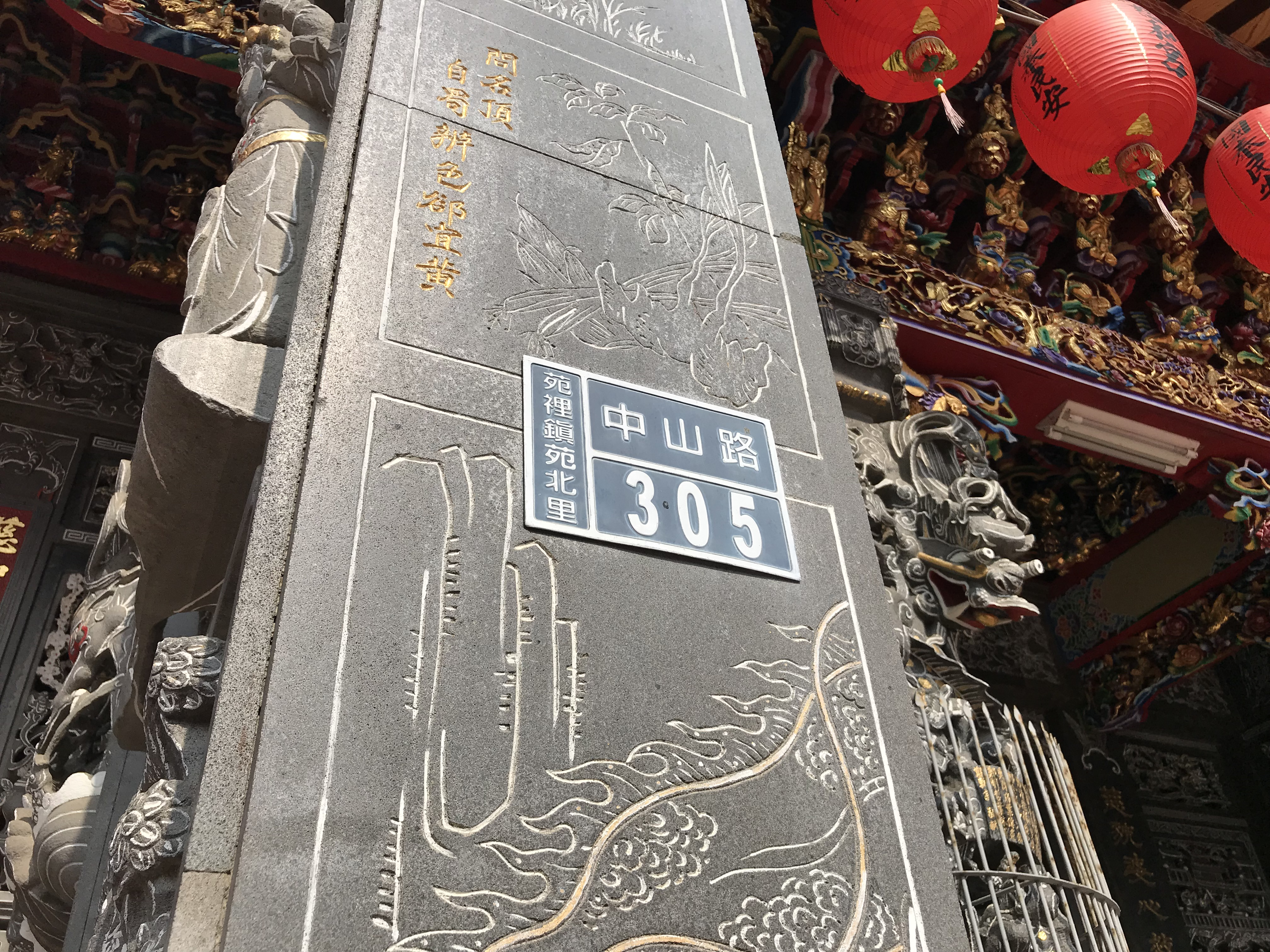 苑裡慈和宮門牌